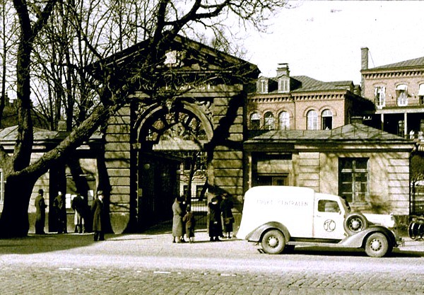 Portalen utanför Serafimerlasarettet. Skåpbil från Fruktcentralen och den kända hästkastanjen "Retzius kastanj".